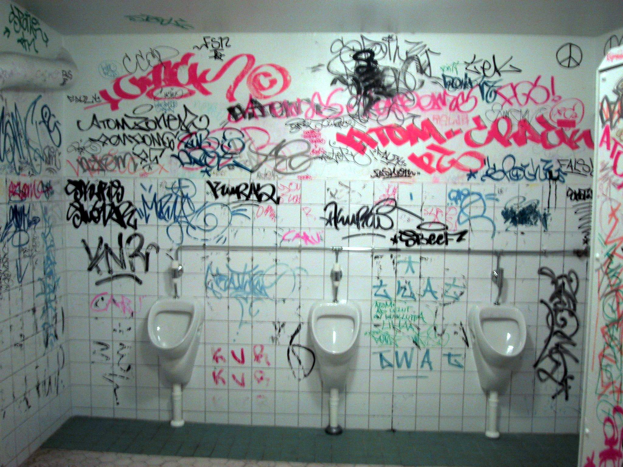 Tags at Meilahti Yläaste Helsinki Finland